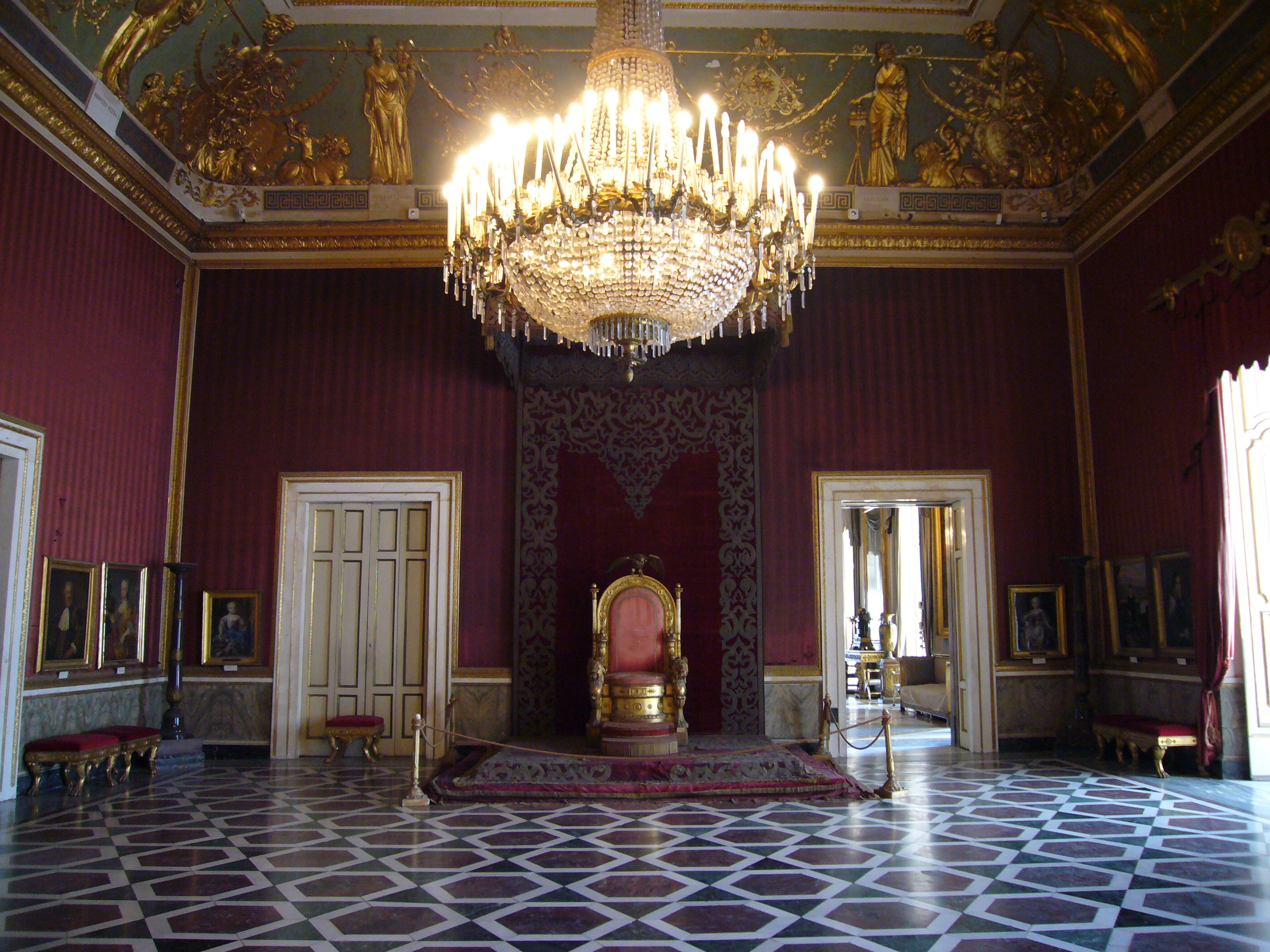 Napoli, Palazzo reale: sala del trono